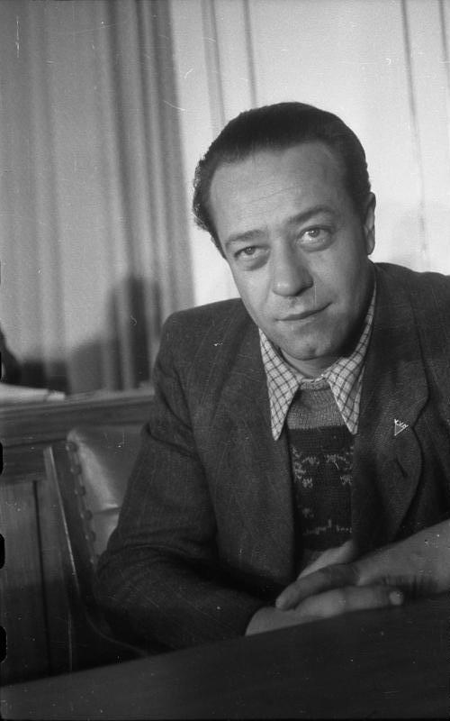 Zentralbild 3.12.1948 Waldemar Schmidt zum Volkspolizeipräsidenten ernannt. Mit Wirkung vom 1.2.50 wurde der Stadtrat Waldemar Schmidt zum neuen Volkspolizeipräsidenten ernannt.